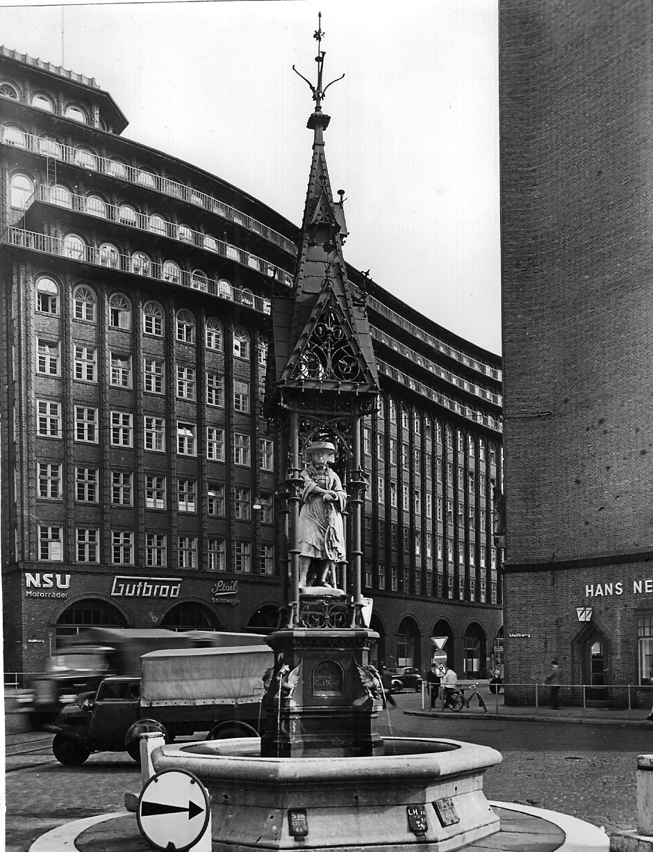 in Hamburg. Damaliger Standort: Messberg beim Chilehaus. Jetziger Standort: Hopfenmarkt bei der Nikolaikirche, dazwischen Neuer Großmarkt